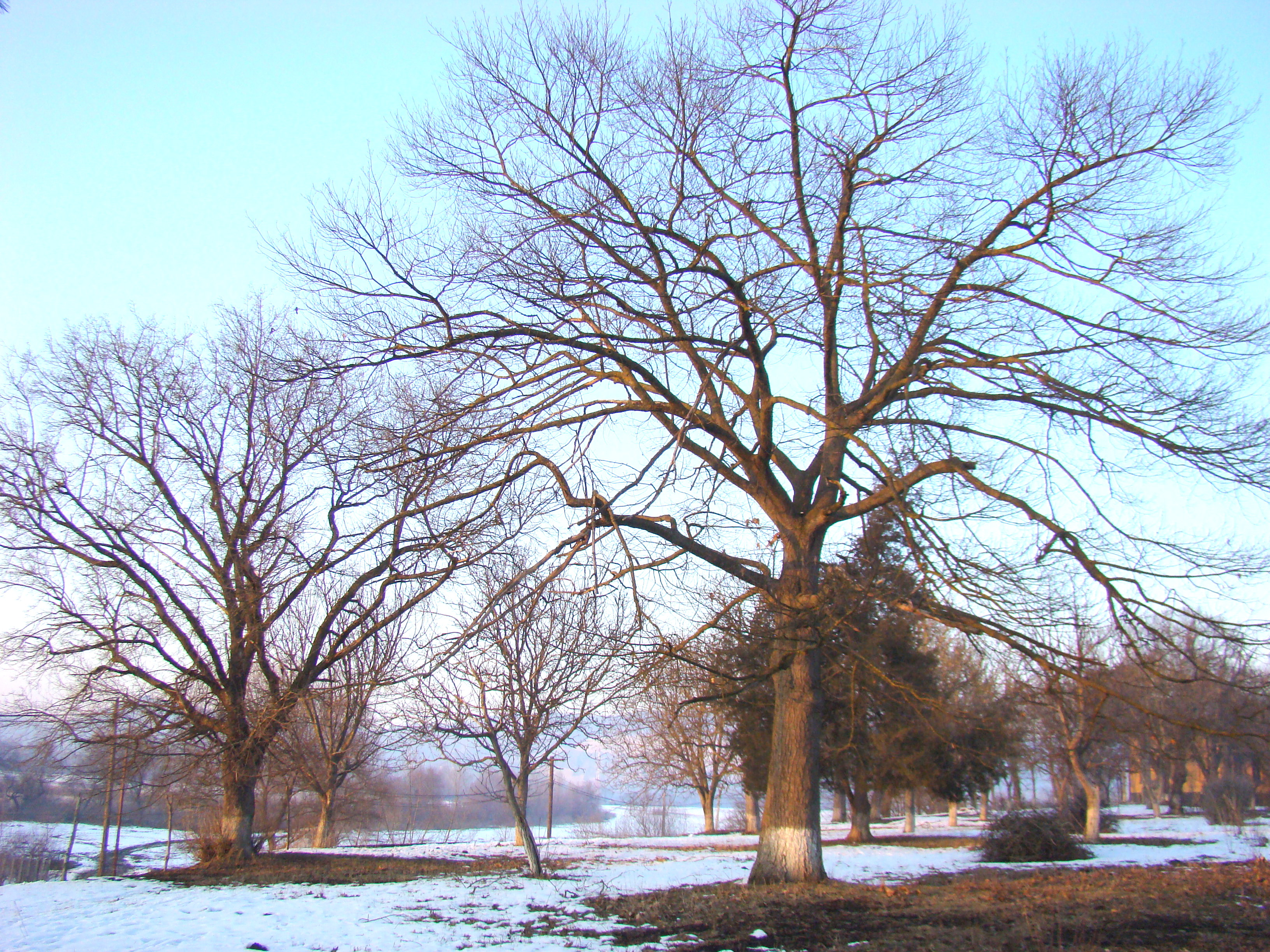 Parcul castelului Degenfeld din satul Cuci, comuna Cuci, judeţul Mureş 02